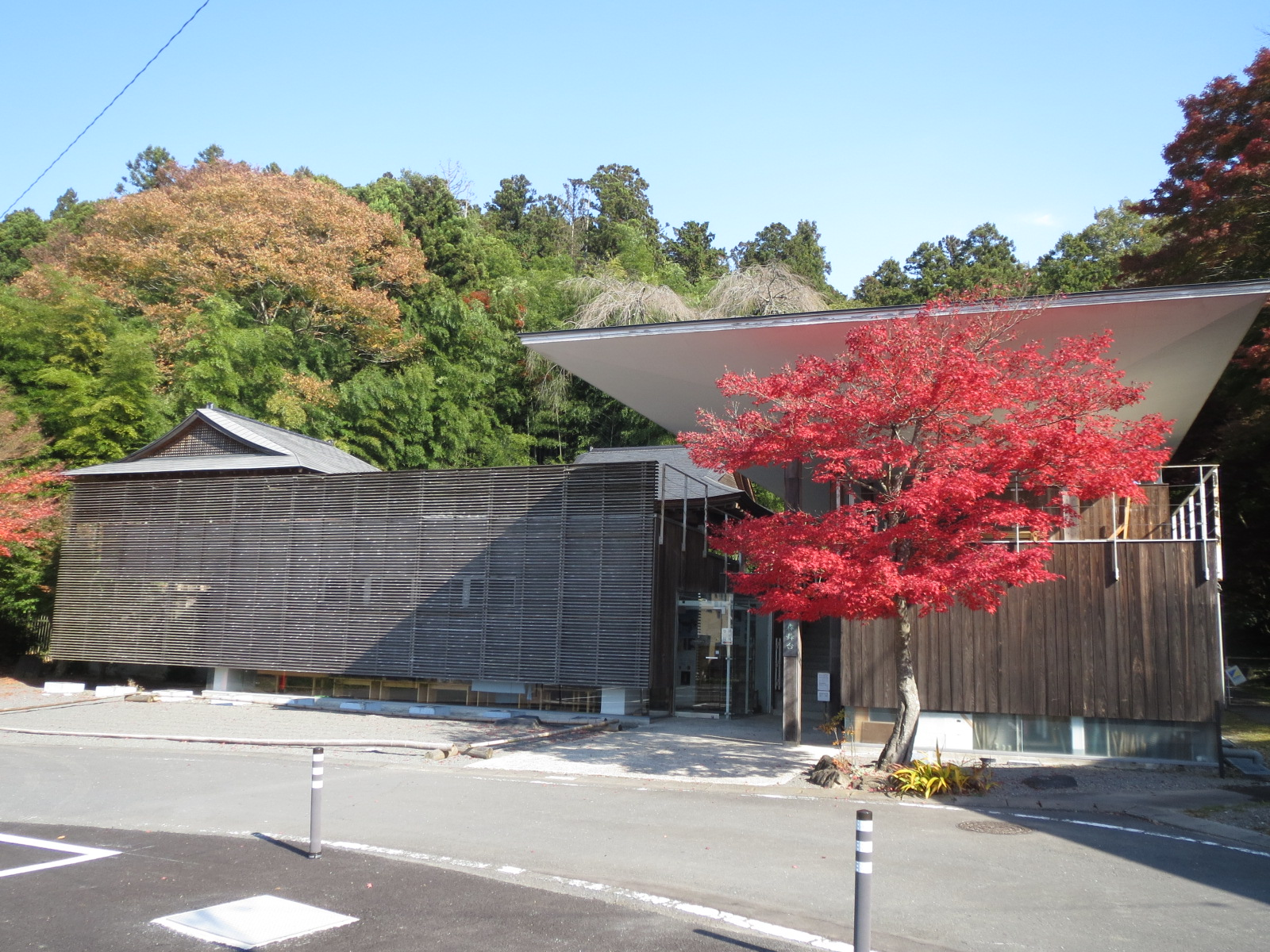 登米市にある伝統芸能伝承館森舞台正面 Canon IXY 3